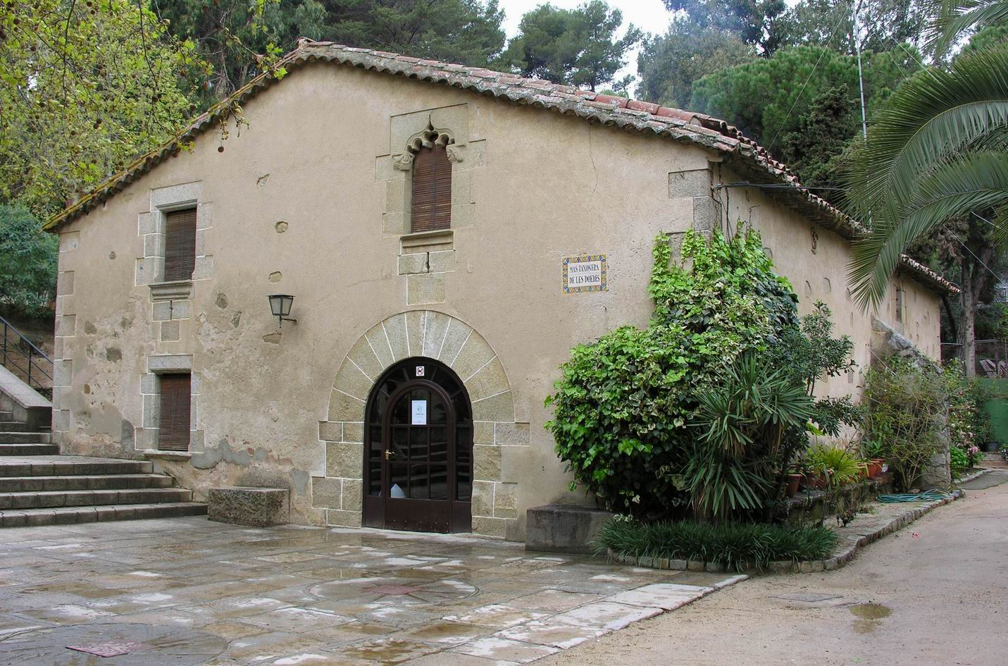 Masia de Can Taxonera a Arenys de Mar, El Maresme, Catalunya.